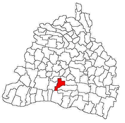 Amplasarea în cadrul județului.